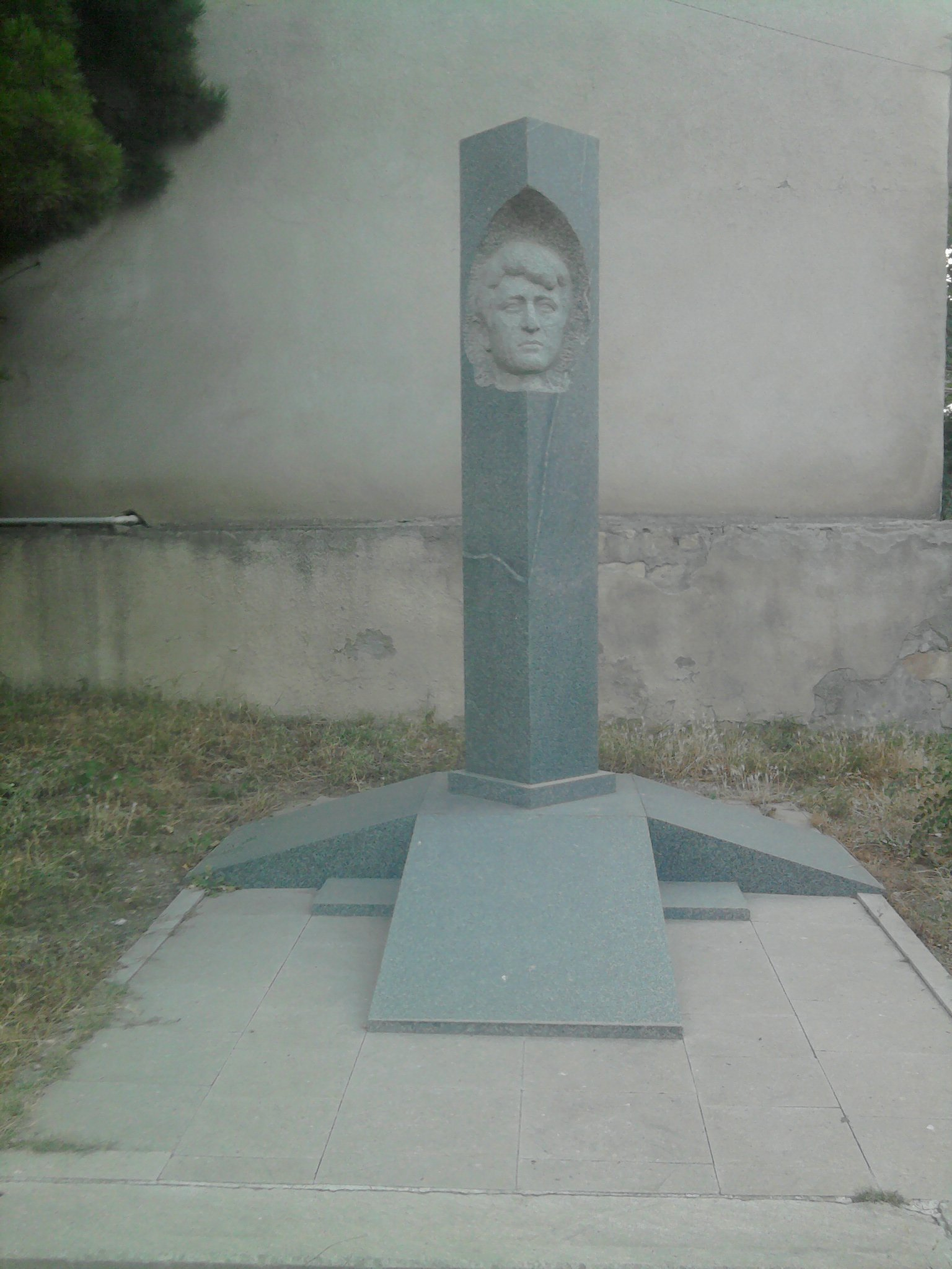 Ա.Մկրտչյանի արձանը